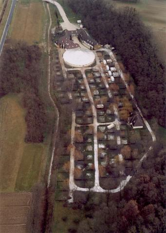 Galambok, Hungary, aerialphotography